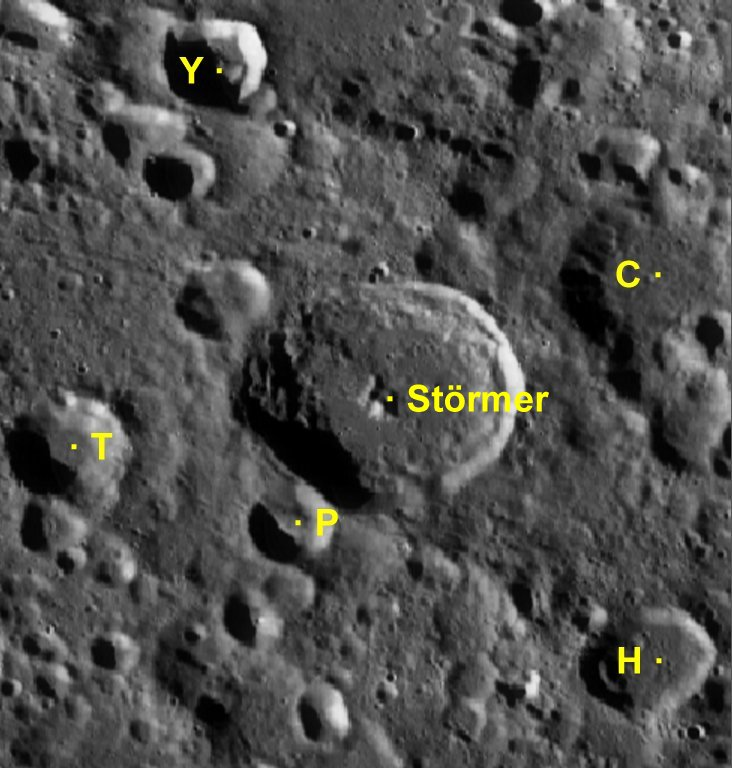 Cráter lunar Störmer. Cráteres satélite. (Imagen LRO)